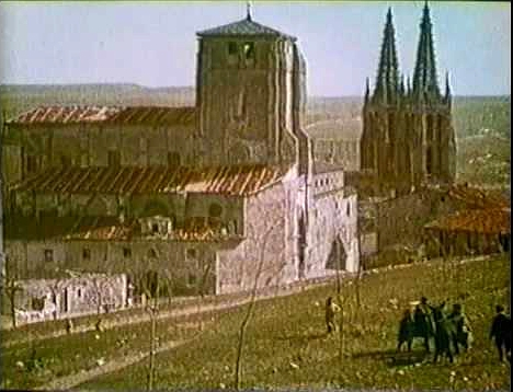 Fotograma del documental de Segundo de Chomón Viaje a Burgos, 1910-1911